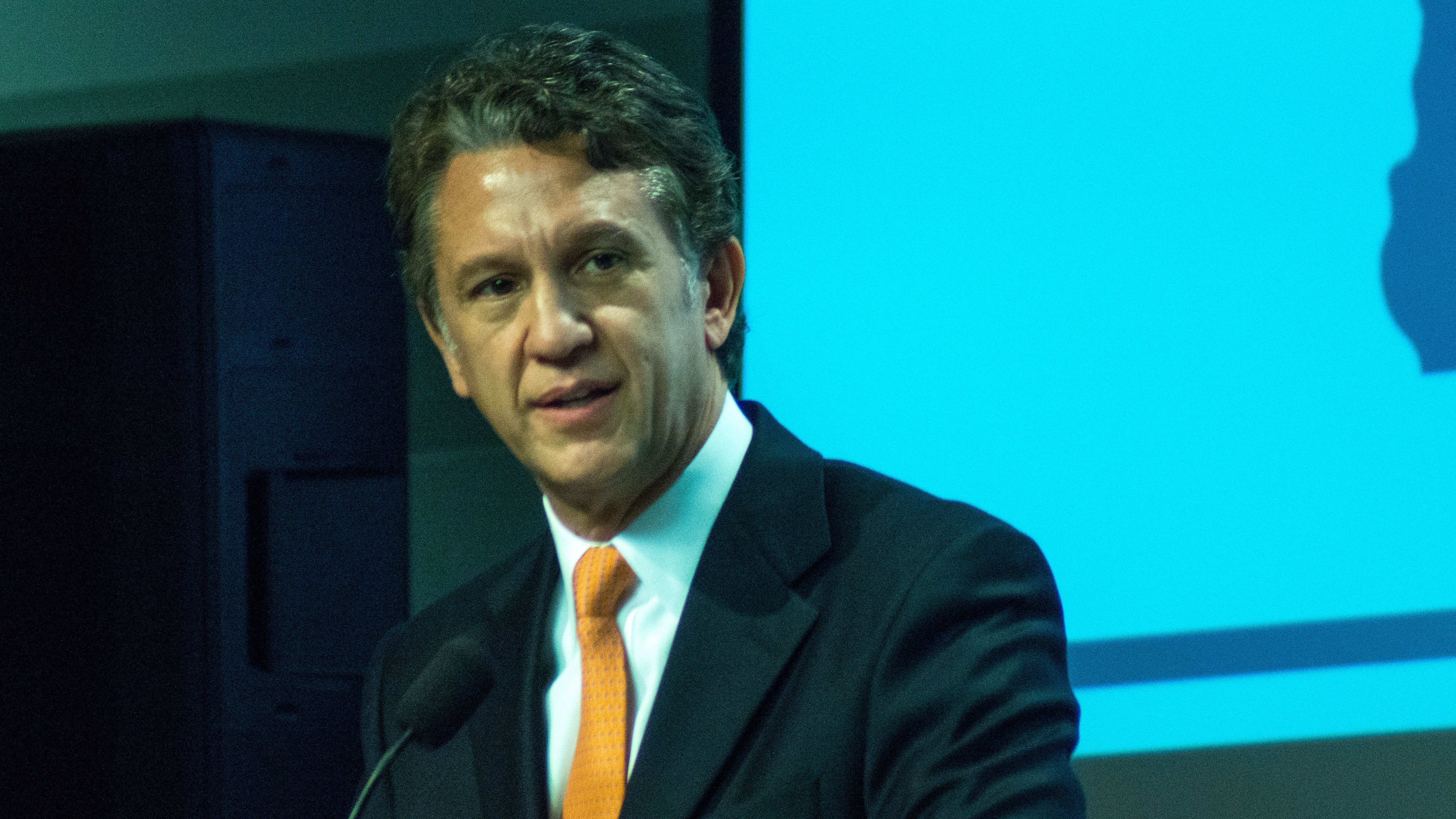 Rick Lazio